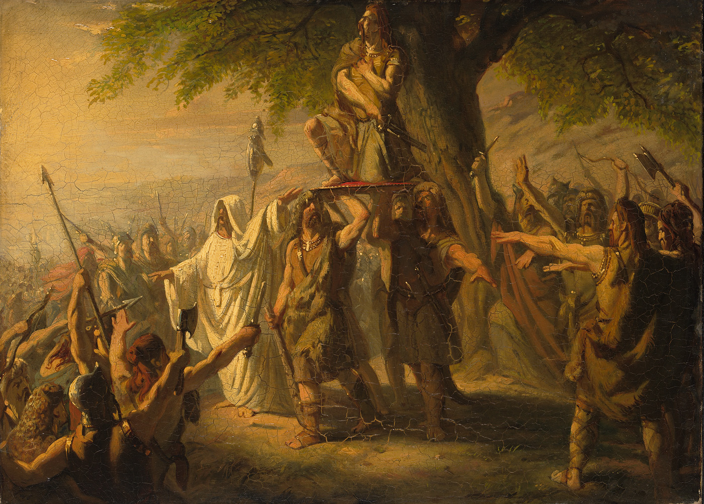 schilderij; Vos, Jacob de; geschiedenis (iconografie)